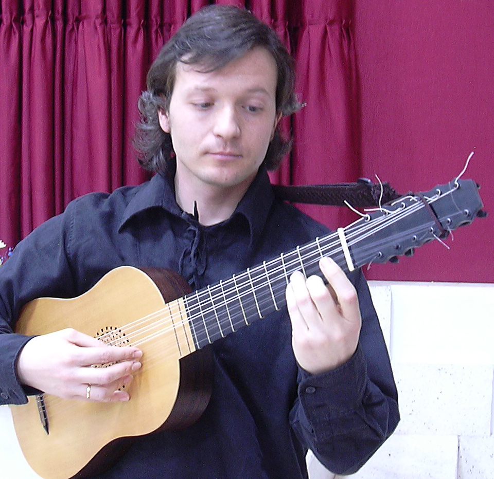 Vèneto: Vihuela